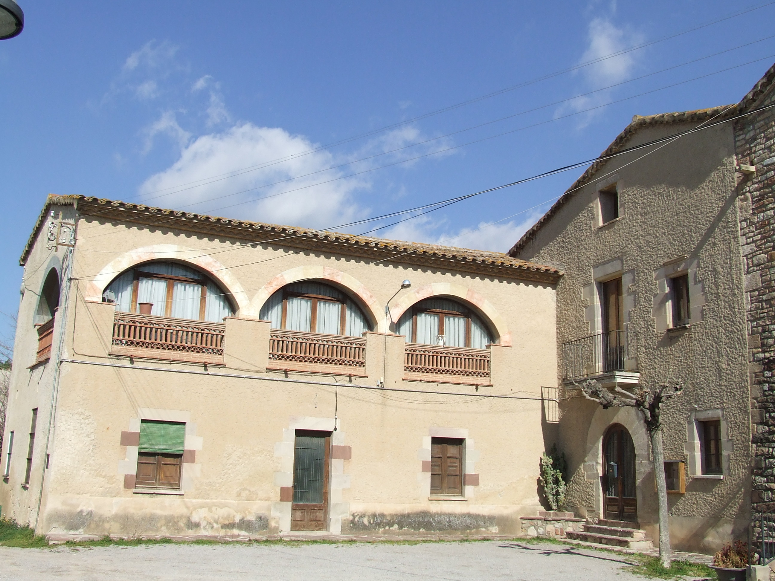 La Rectoria de Bigues (Bigues i Riells, Vallès Oriental)